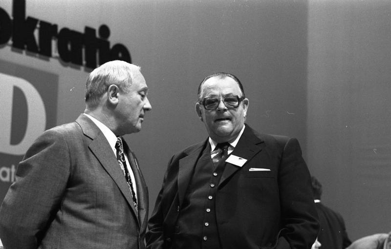 Außerordentlicher Parteitag der SPD in der Westfalenhalle Dortmund